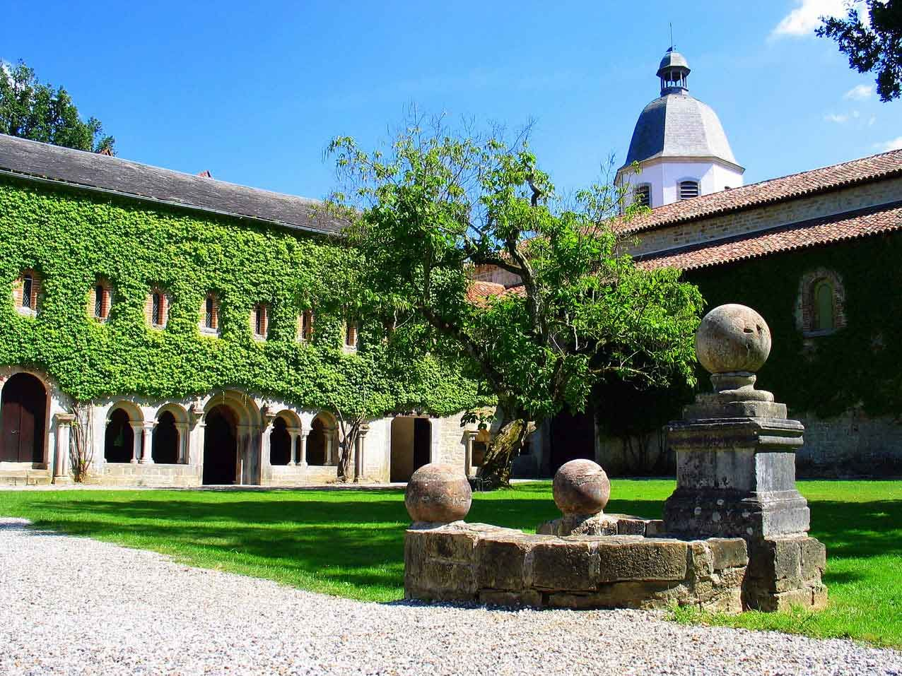 Cour intérieure de l'Abbaye de l'Escaladieu - hautes-Pyrénées - France